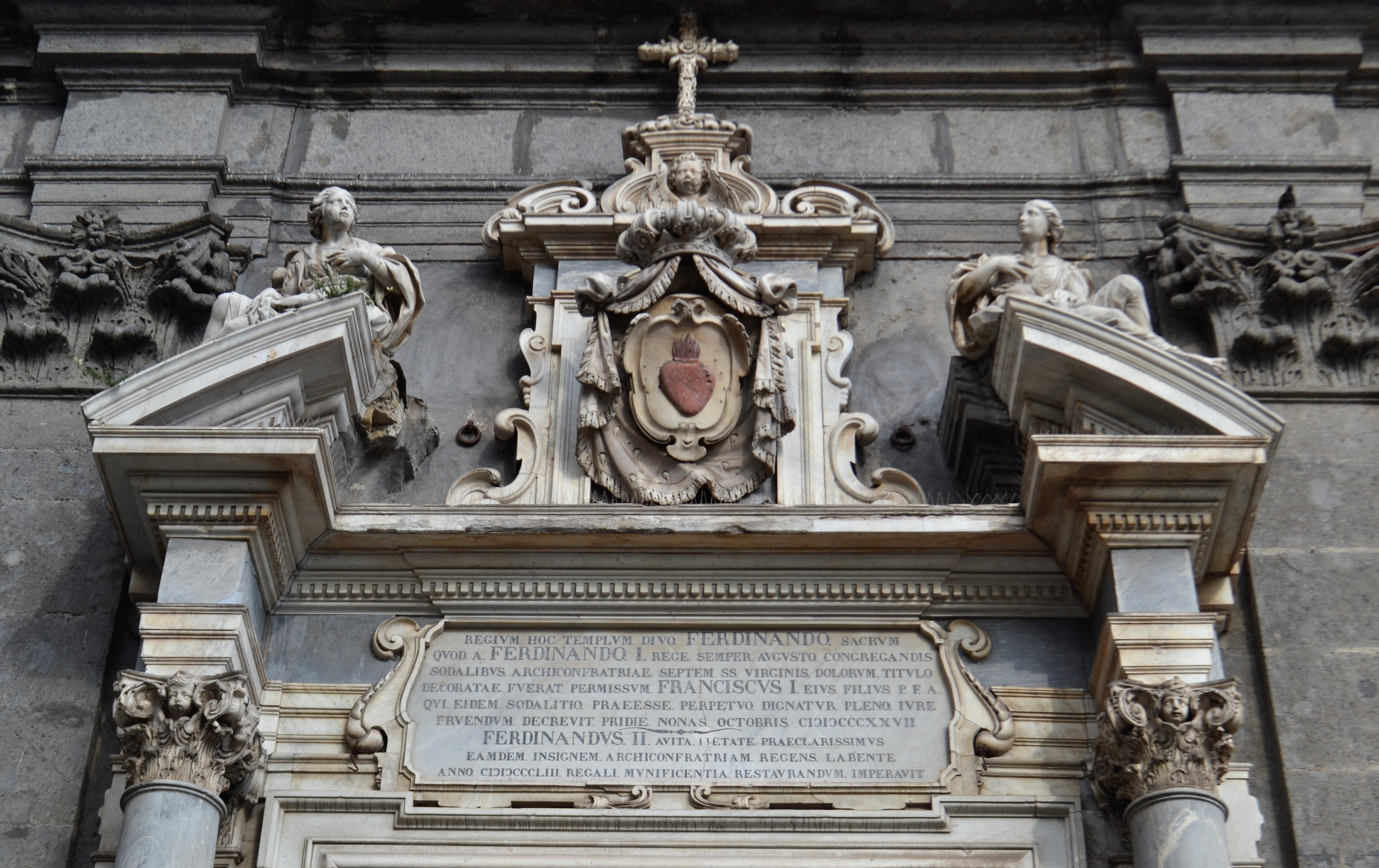 Particolare del portale esterno della Chiesa di San Ferdinando di Napoli